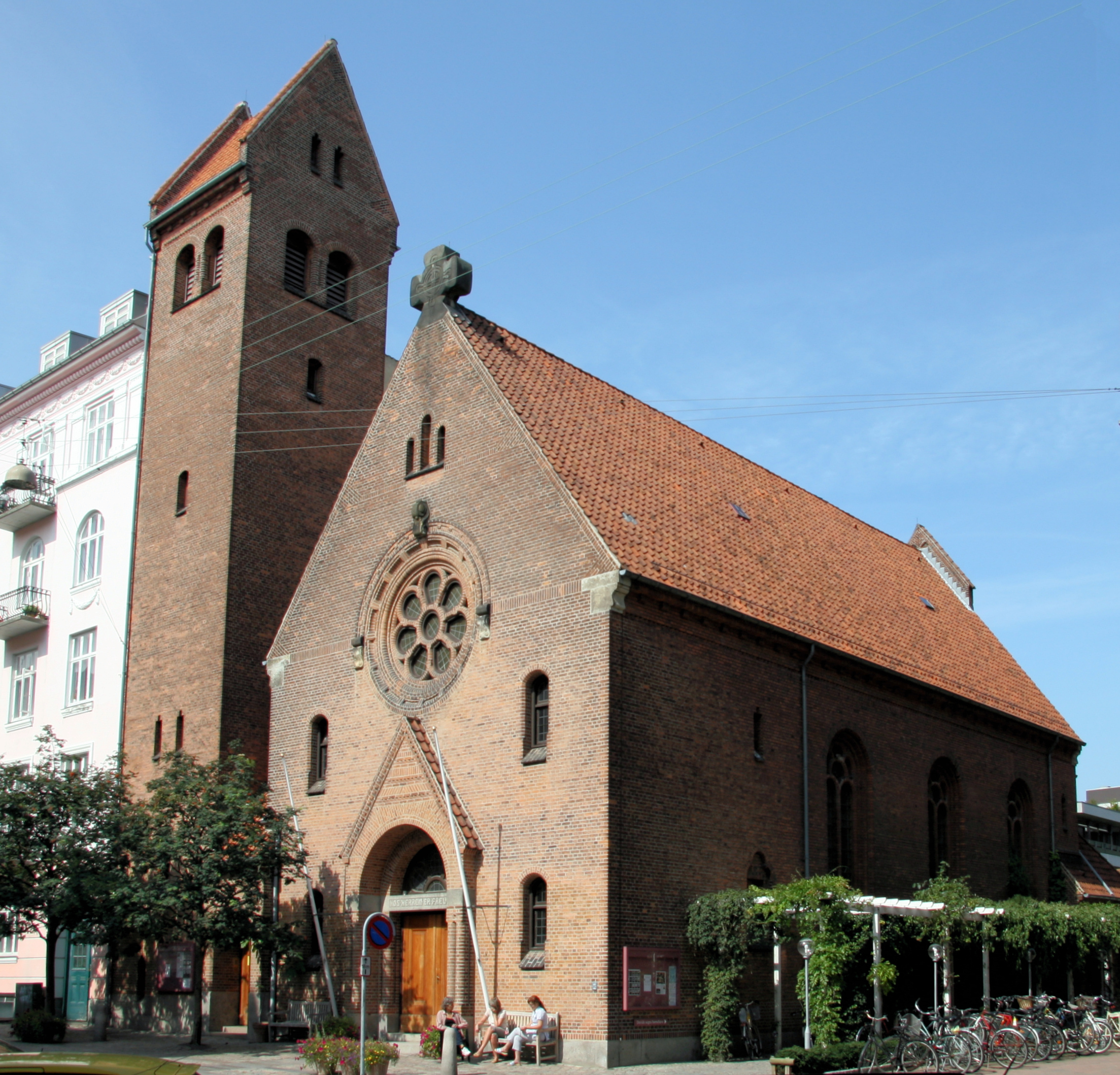 Davidskirken in Copenhagen, Denmark.